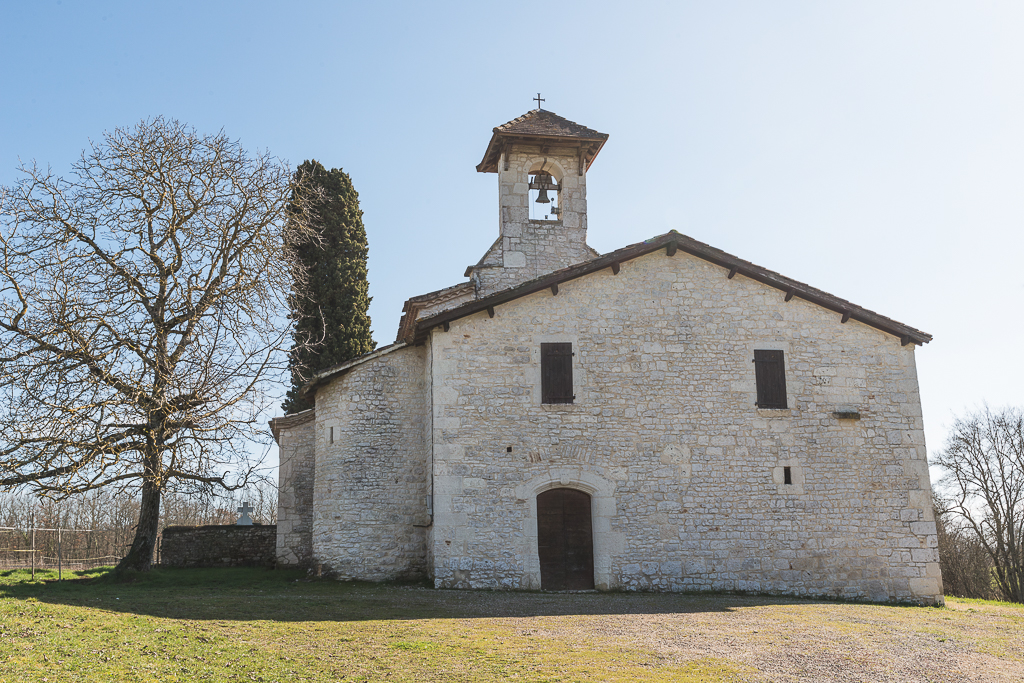 Eglise de Saint-Martin de Caussanille